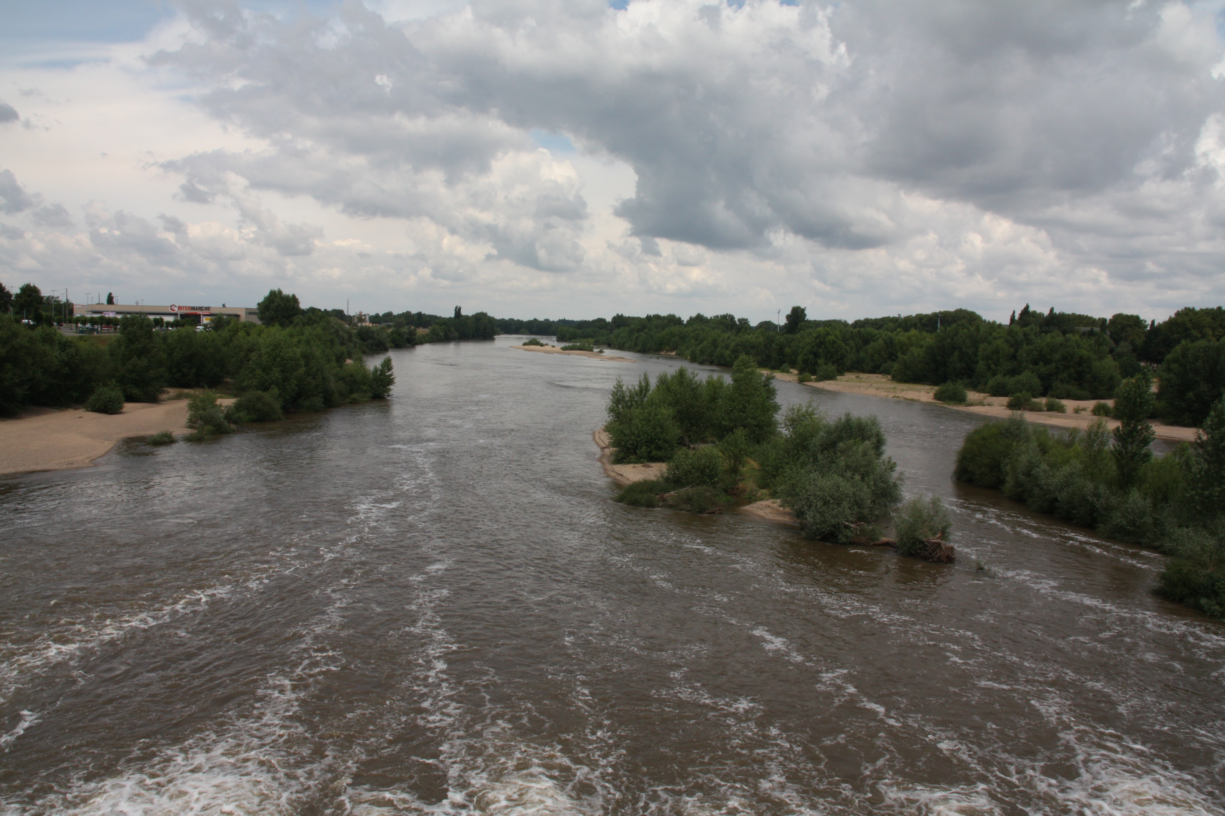 Moulins, France